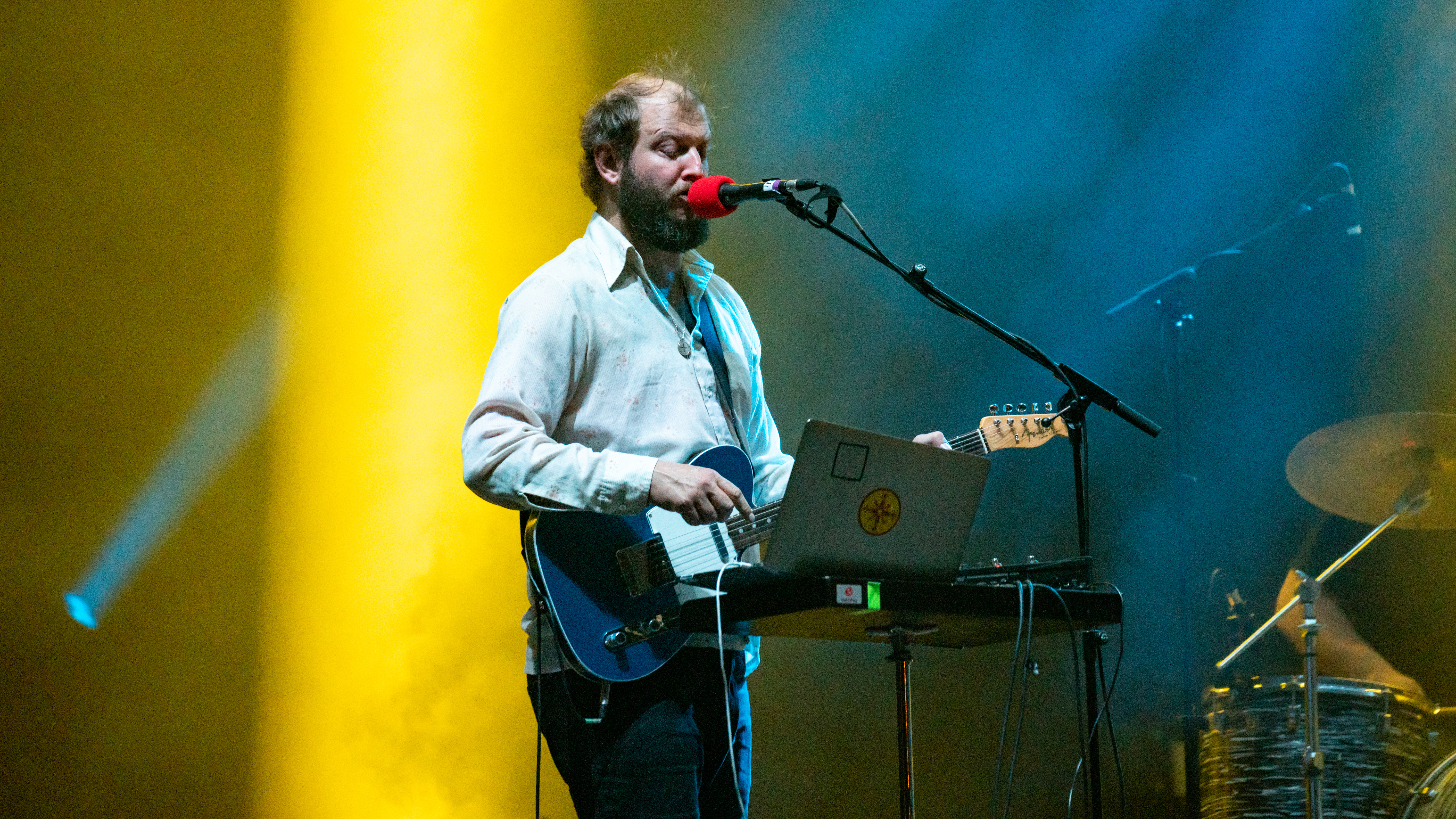 Primavera19_-13